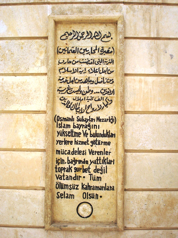 Türkmençe: Osmanli Şehitler Duvar Resmi Kerkük Kalesi